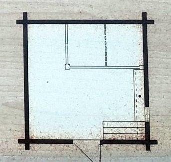 Строчыца. БДМНАБ. Кузня з в. Клочкава